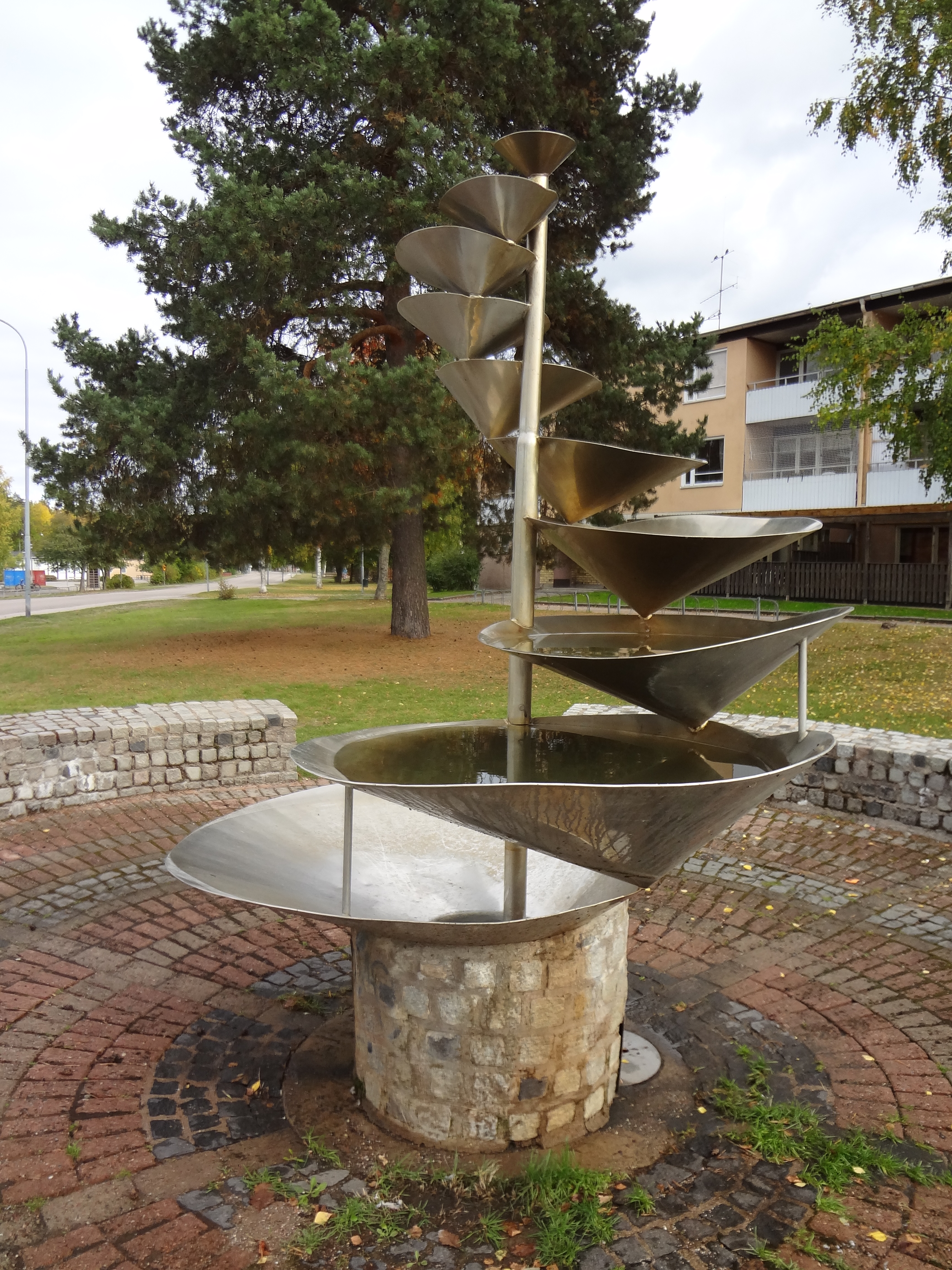 Konstverket "Vattenstege" i rostfritt stål av Hans Lindh. Placerad i Lagersberg i Eskilstuna.